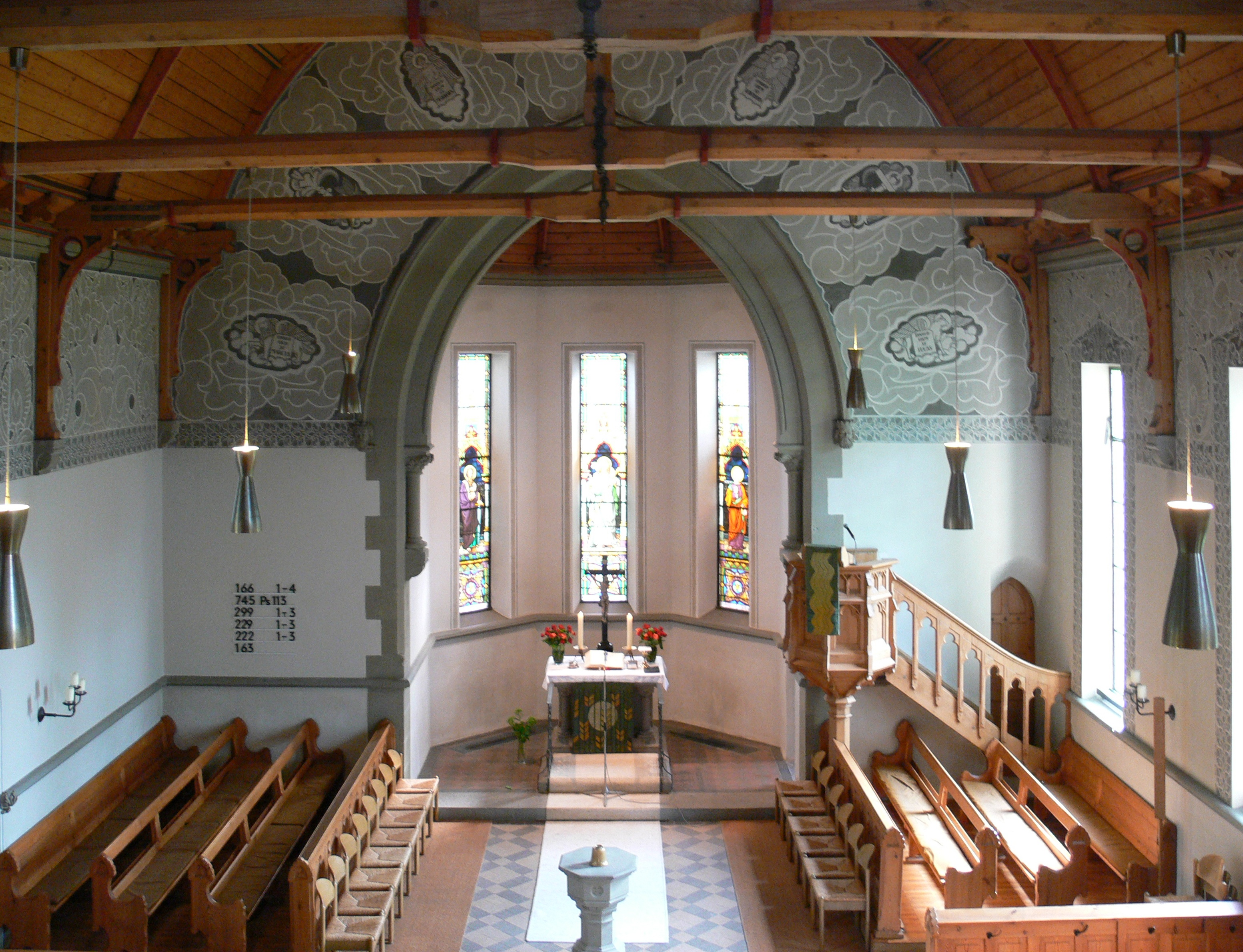 Bad Waldsee, Evangelische Kirche, Blick von der Empore zum Chor